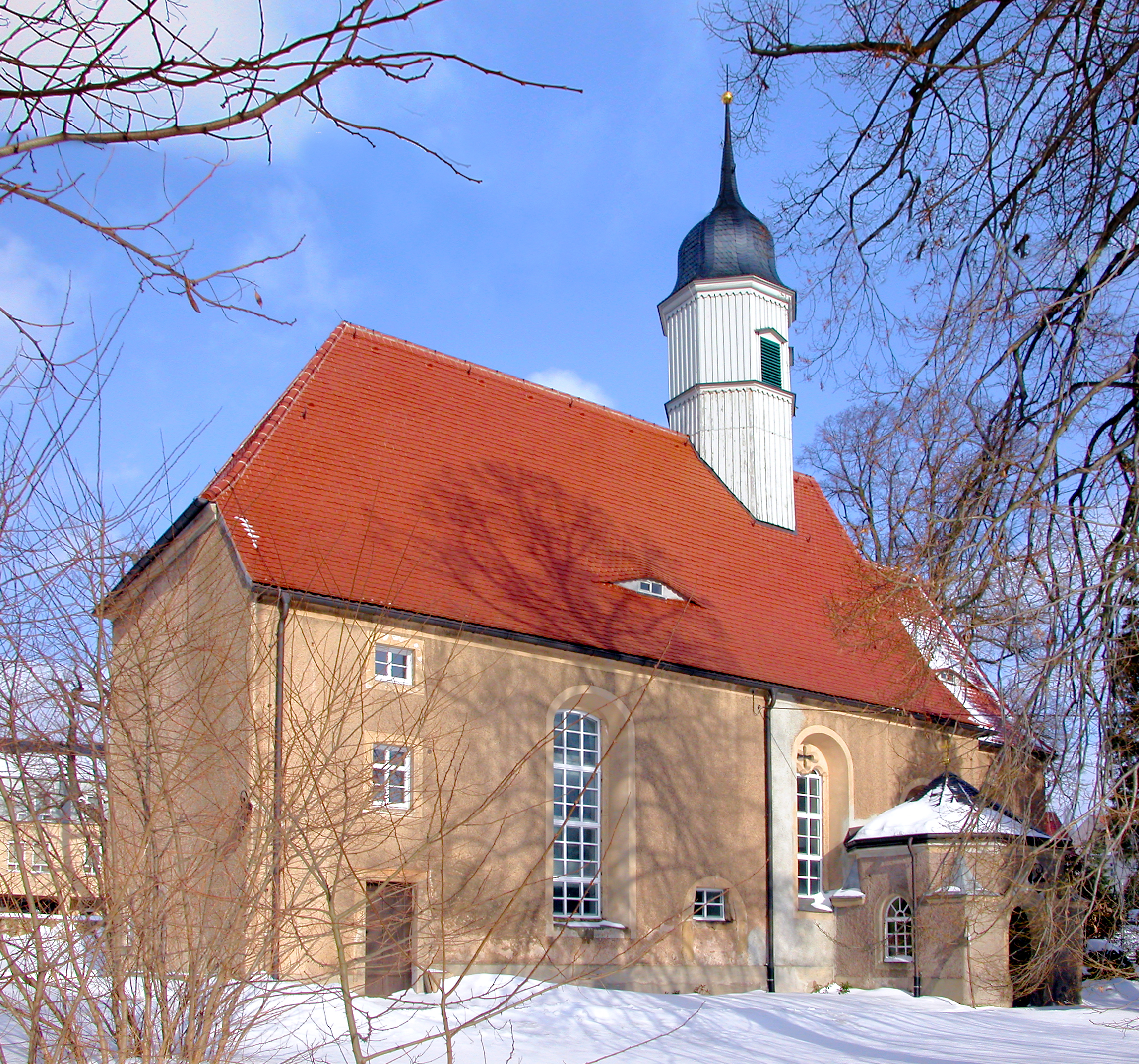 30.01.2010 01734 Rabenau: Evangelische St. Egidien Kirche (GMP: 50.962942,13.641054) am Markt. Einschiffiger Renaissancebau (1642). Sicht von Südwesten. [DSCN40375-40376.TIF]20100130050MDR.JPG(c)Blobelt